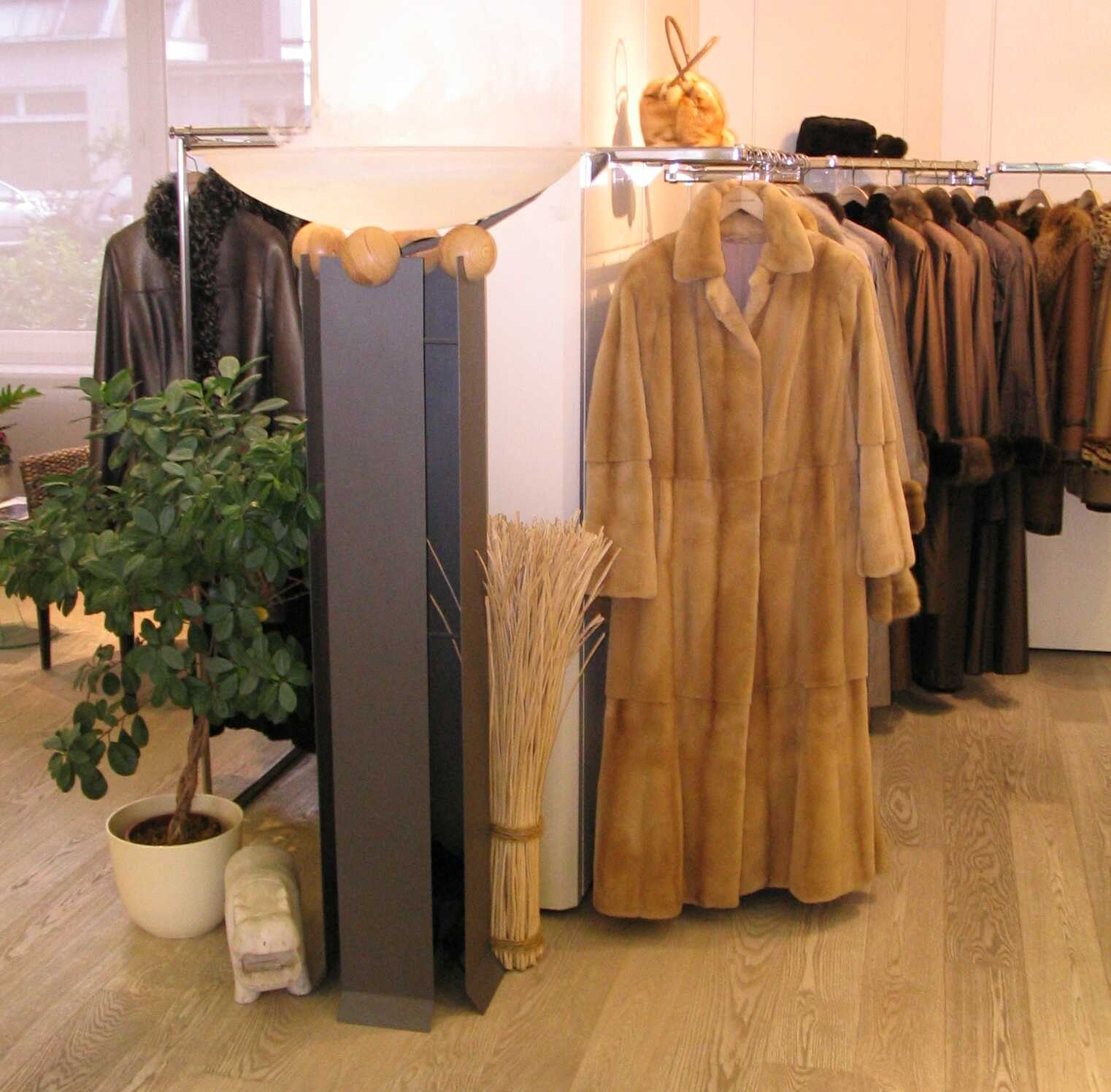 Cychowski, Exerzierplatz 16, 24103 Kiel. Gegründet 1955. Eheleute Ute Wendt-Cychowski und Hans-Jürgen Wendt Rechts Samtnerzmantel